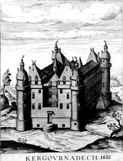 Le château de Kergournadec'h en 1632 (dessin dans le livre de Marc de Vulson de la Colombière " La Science héroïque, traitant de la noblesse et de l'origine des armes" publié en 1644)